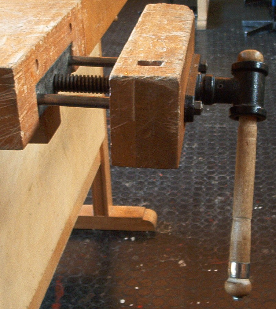 zelf gemaakte foto. Bestemd voor het publiek domein. Martink.